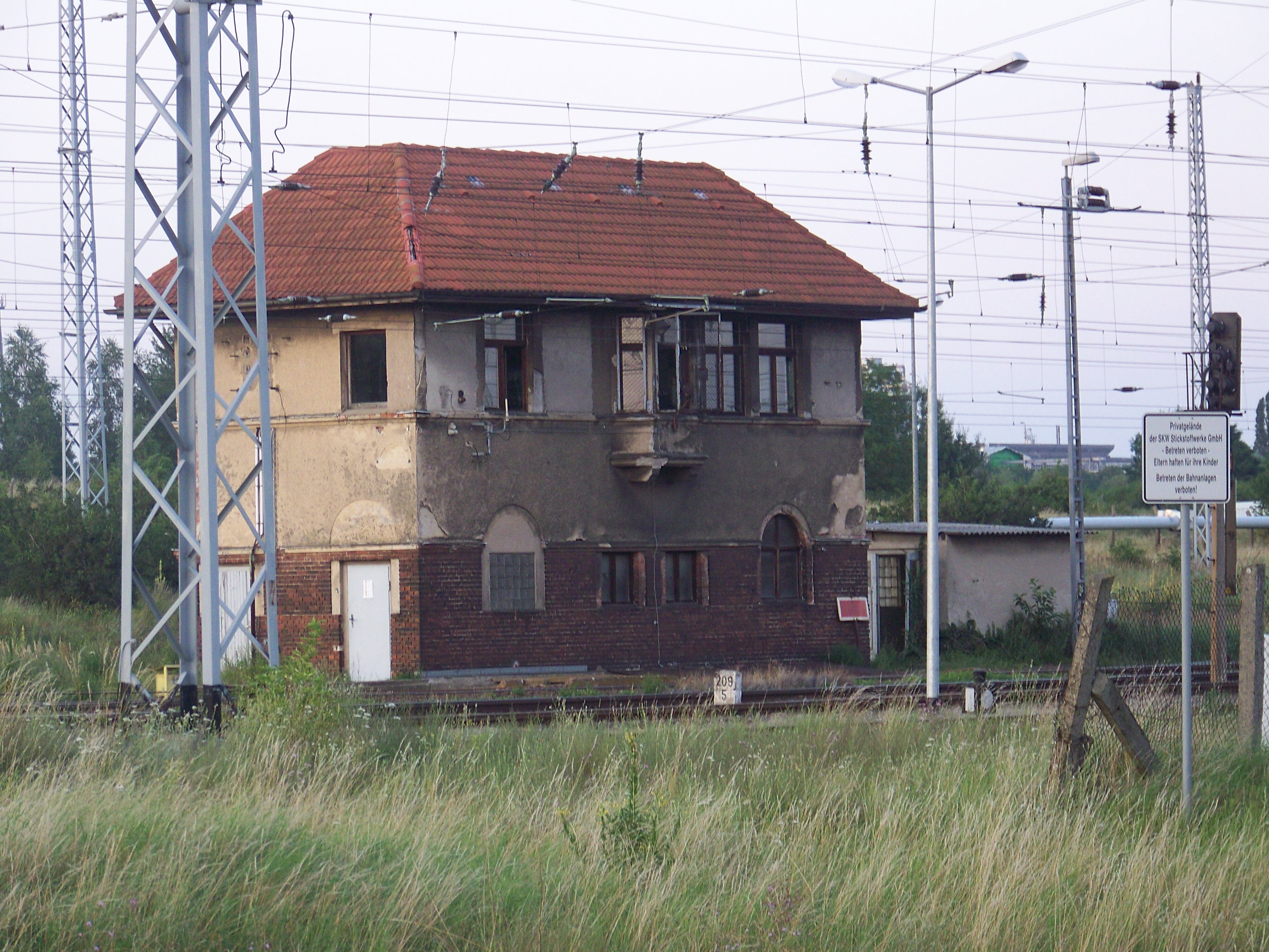 Foto vom Stellwerk Pw an der Bahnstrecke Dessau–Falkenberg/Elster, Standort:zwischen Griebo und Lutherstadt Wittenberg, kurz vor dem Haltepunkt Piesteritz, am Beginn der Firmenanschlussgleise.